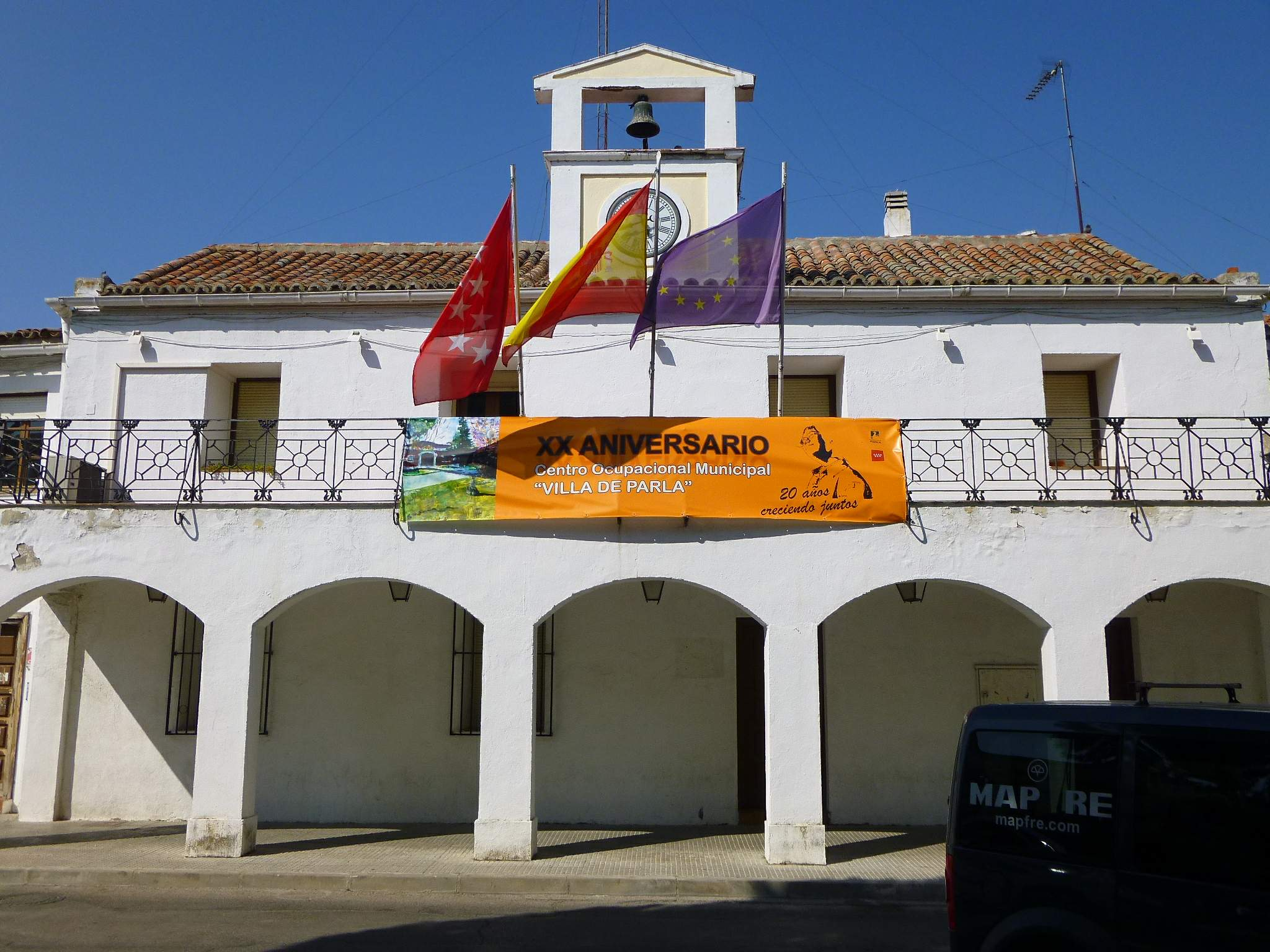 Antiguo Ayuntamiento de Parla (Madrid)